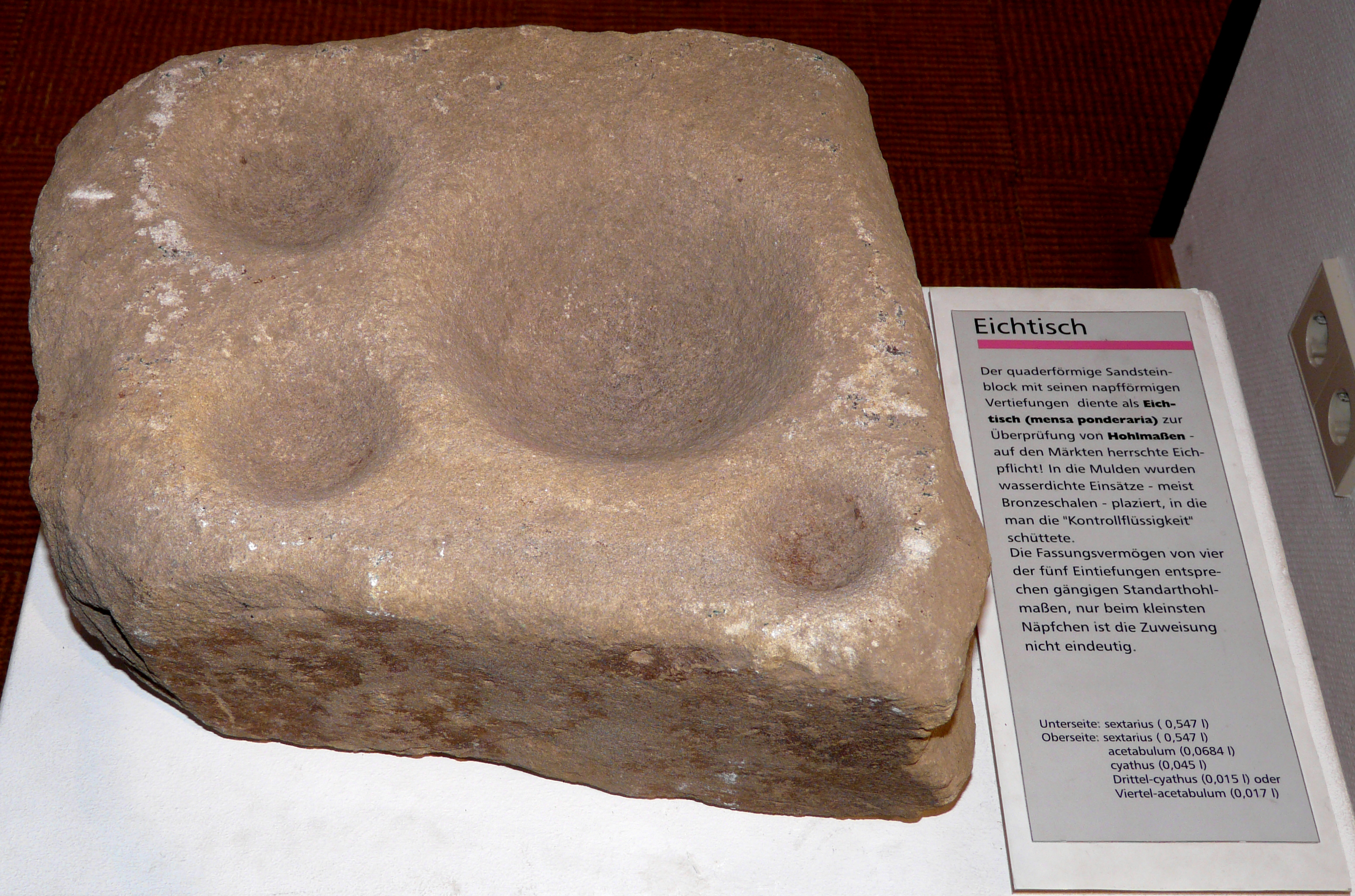 Eichtisch (mensa ponderaria) aus dem römischen Vicus von Wiesloch